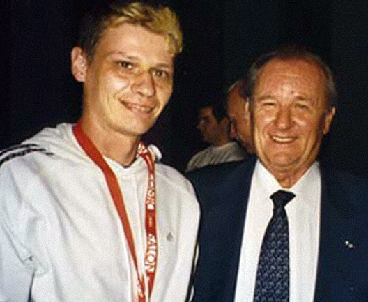 De Claude Christ an den Albert Uderzo 2004 zu Erlangen.